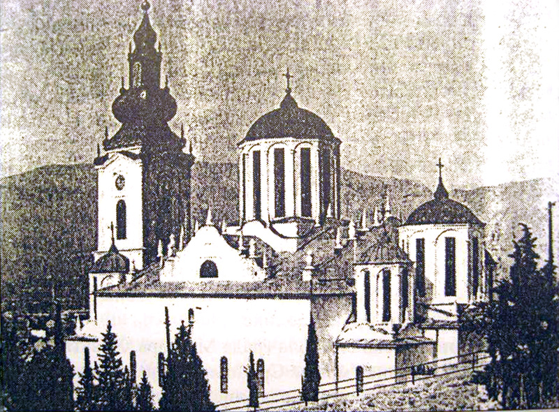 Српски (ћирилица): Саборна црква у Мостару